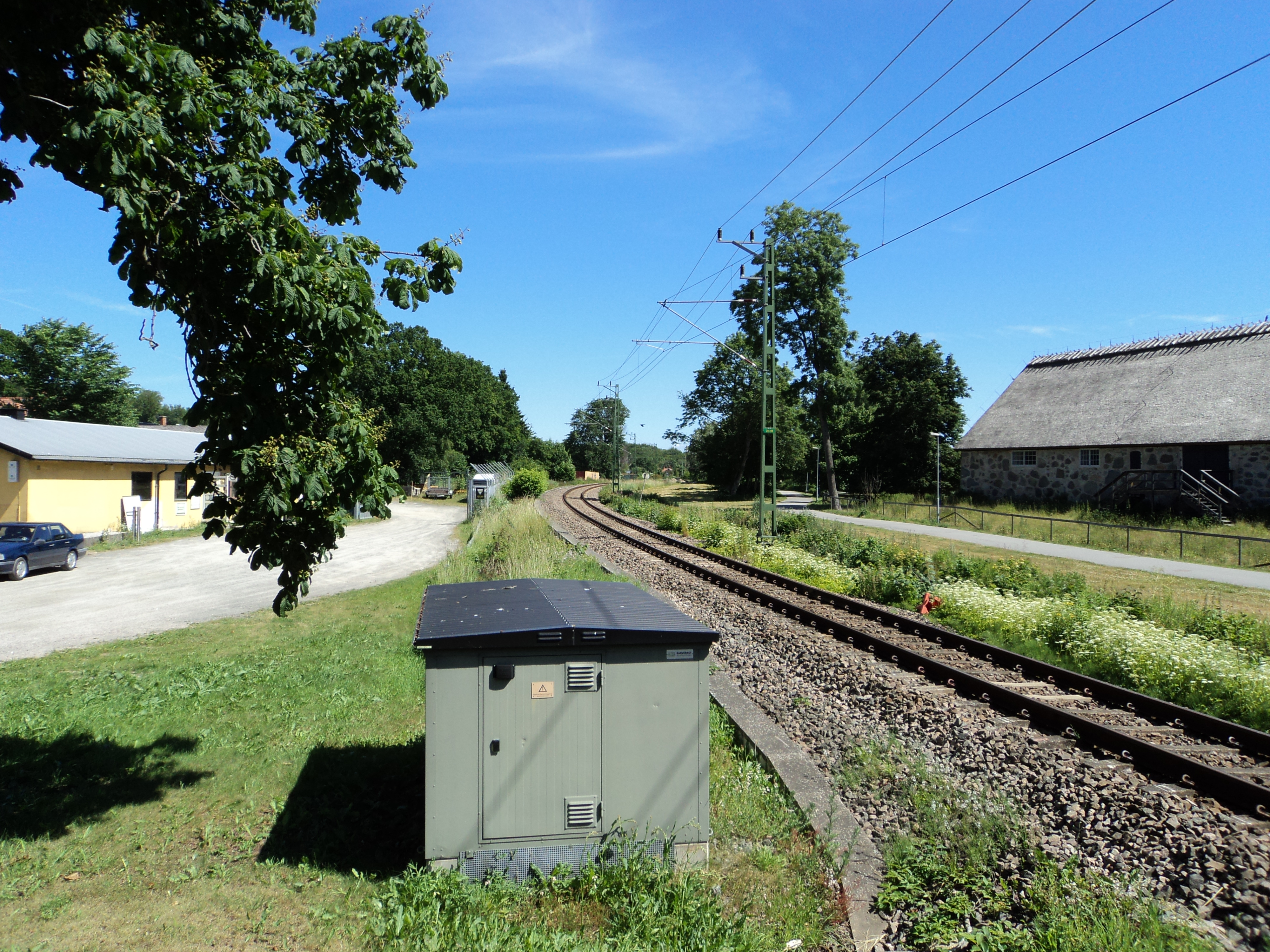 Blekinge kustbana i höjd med Sölvesborgs slottsruin strax öster om Sölvesborgs station.